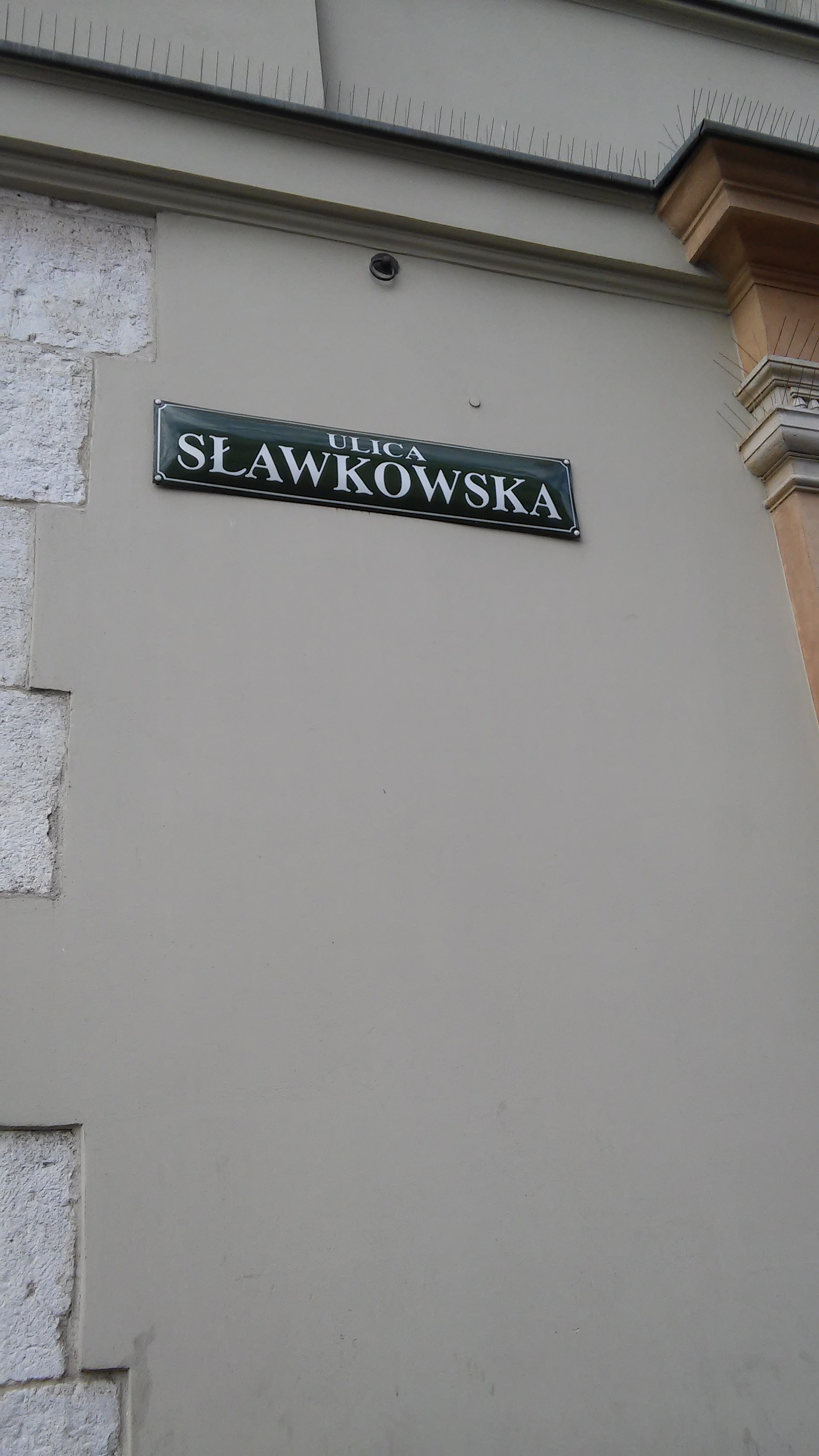 Ul. Sławkowska w Krakowie, tabliczka z nazwą ulicy